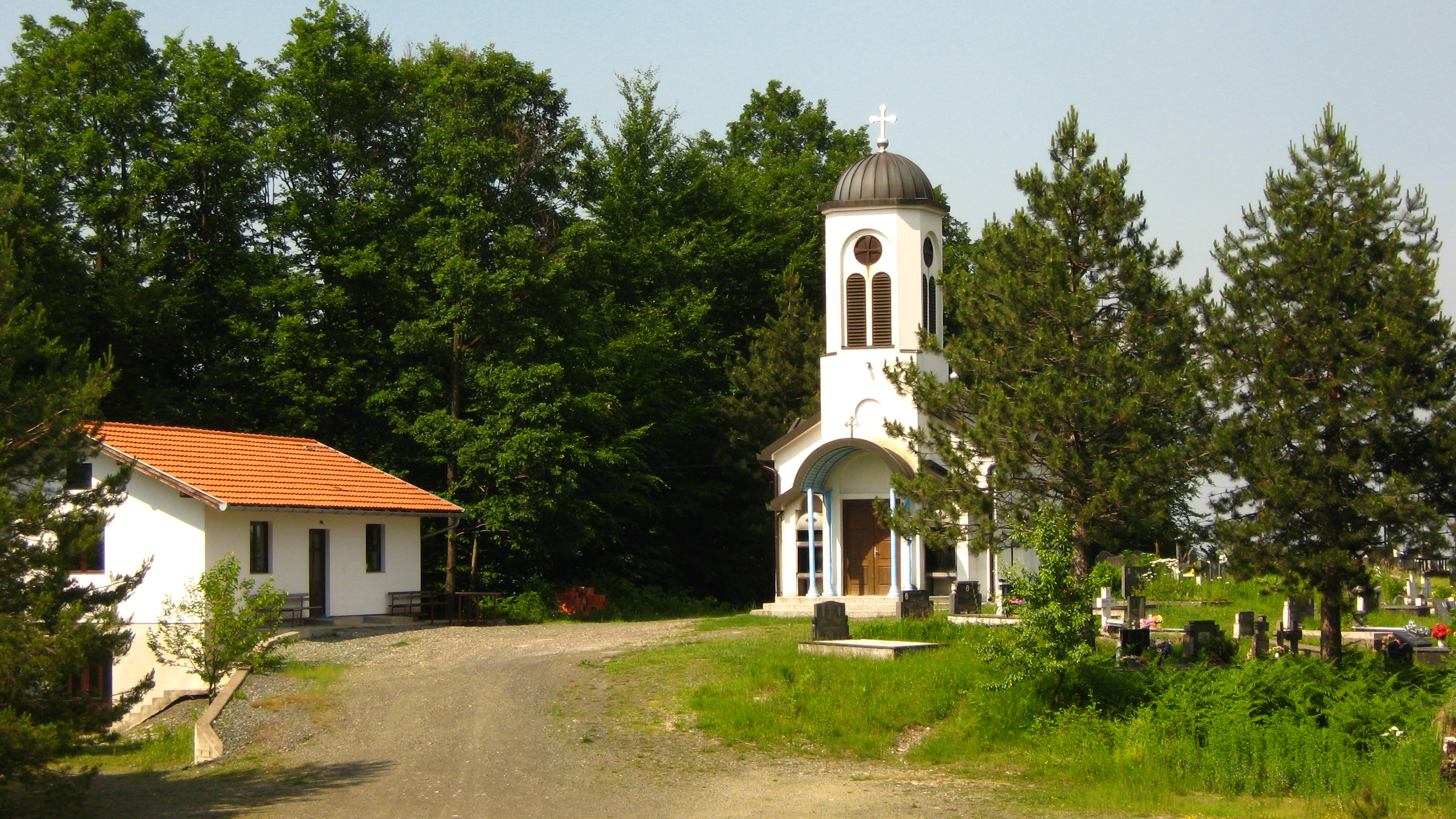 Црква у Влајићима код Теслића, у Српској. Licensing